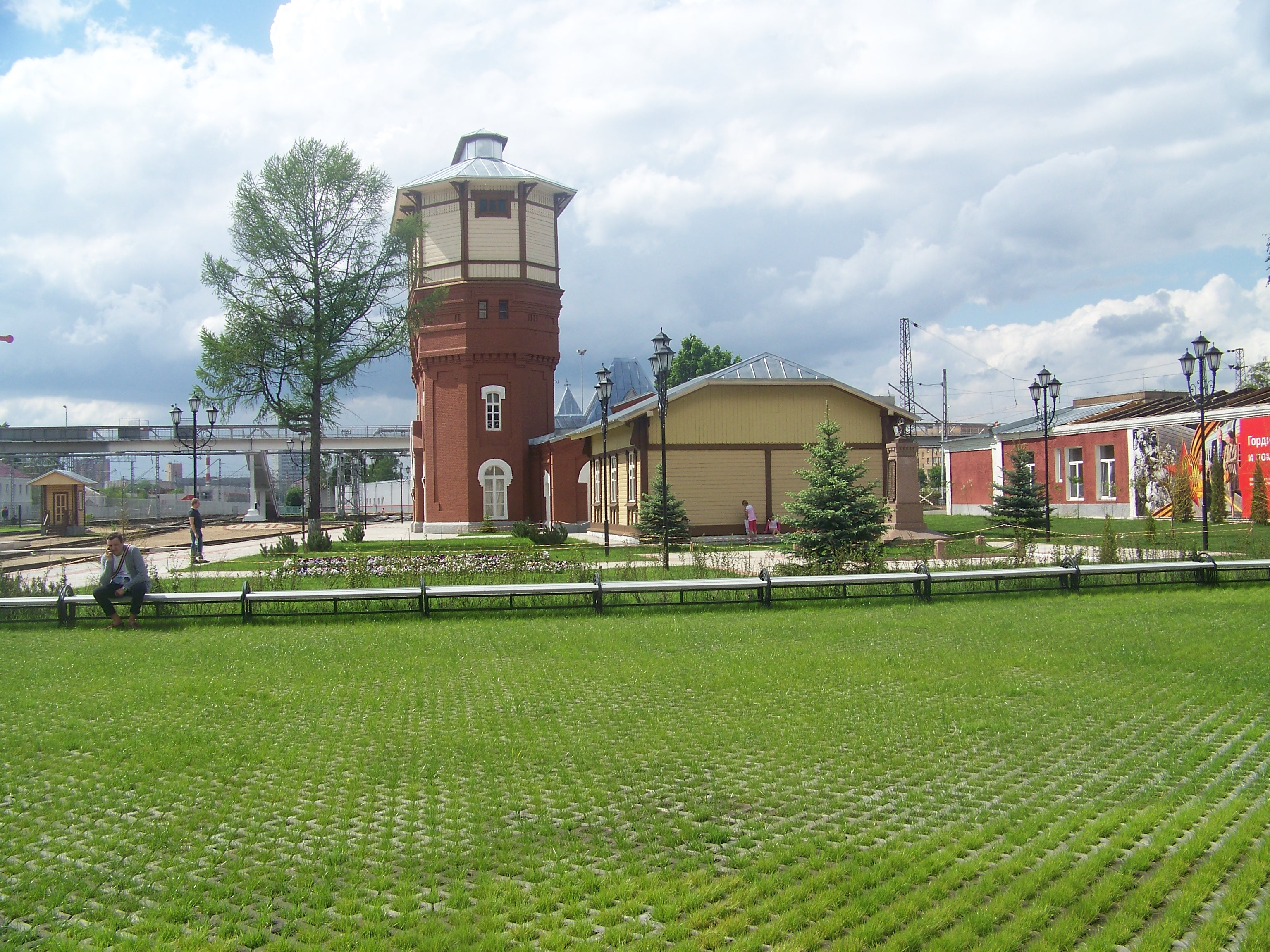 Водонапорная башня на станции Подмосковная